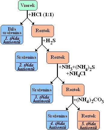 Rozdělení kationtů na třídy podle sulfanové zkoušky, vytvořil wikipedista TeEs.